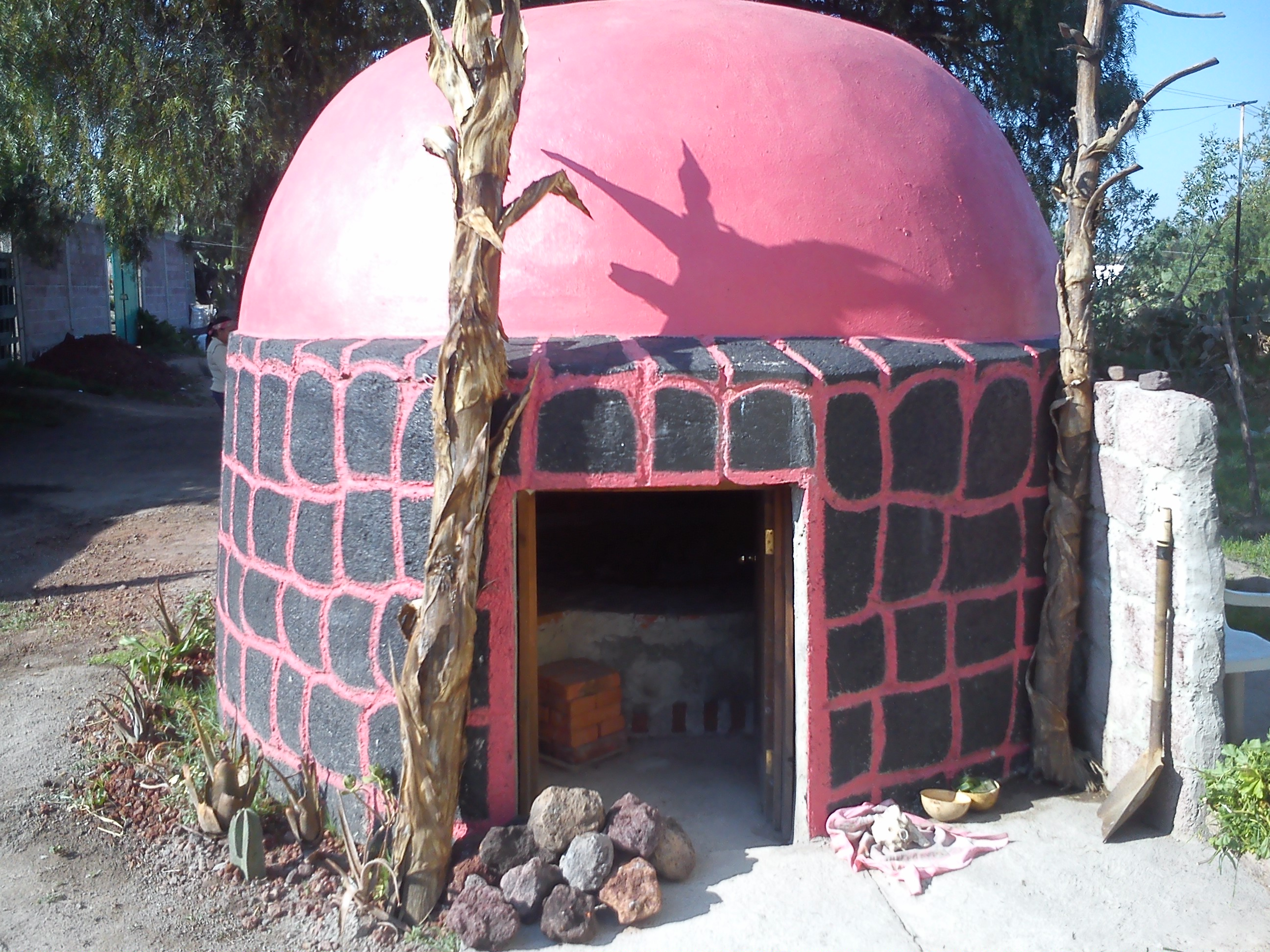 Temazcal en Temascalapa Estado de Mexico.